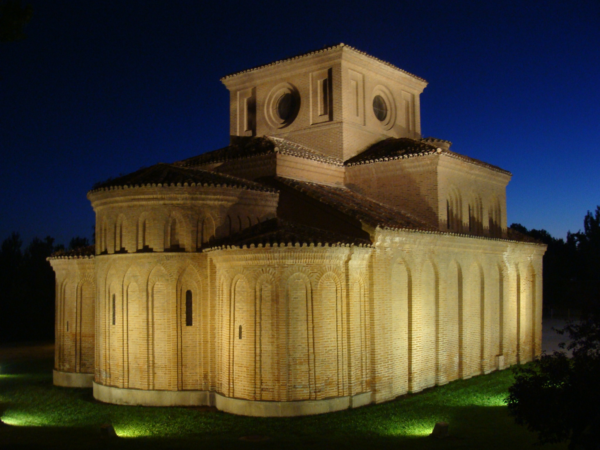 Iglesia de Santiago, en Salamanca